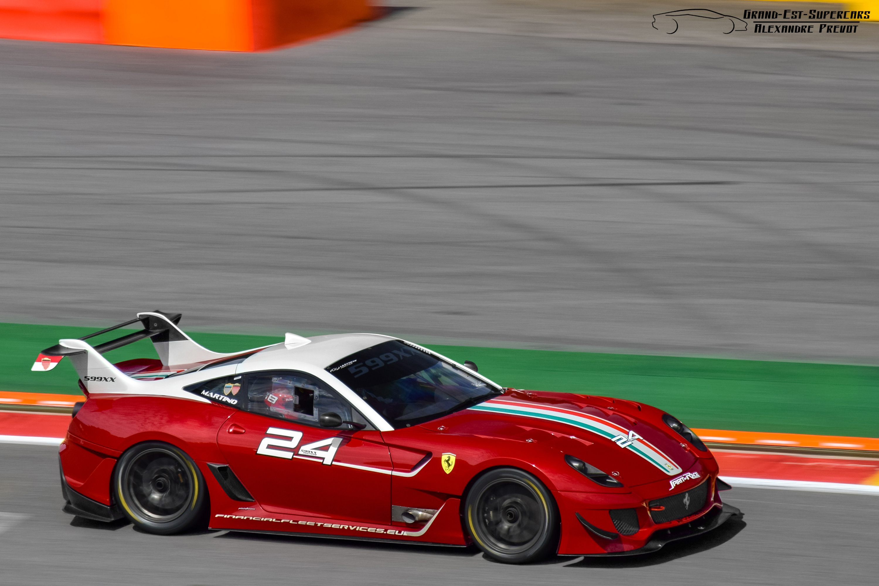 S/N : 189429 Numéro : 24